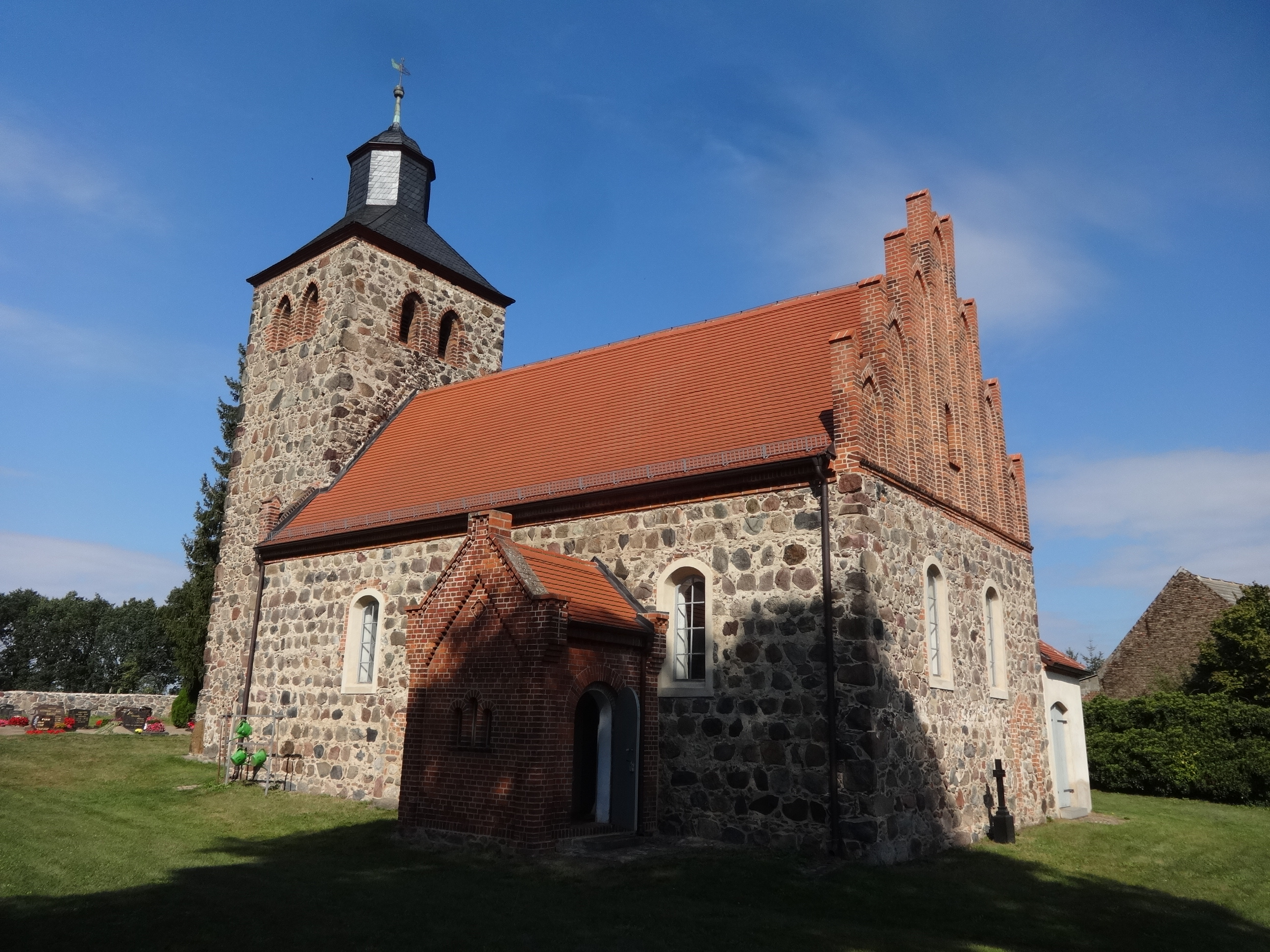 Die Dorfkirche in Fröhden ist eine Feldsteinkirche aus dem Anfang des 14. Jahrhunderts. Der Turm wurde im 15. Jahrhundert angebaut. Im Innern befinden sich unter anderem ein Altaraufsatz aus dem Jahr 1797 und eine Fünte aus dem Jahr 1851.